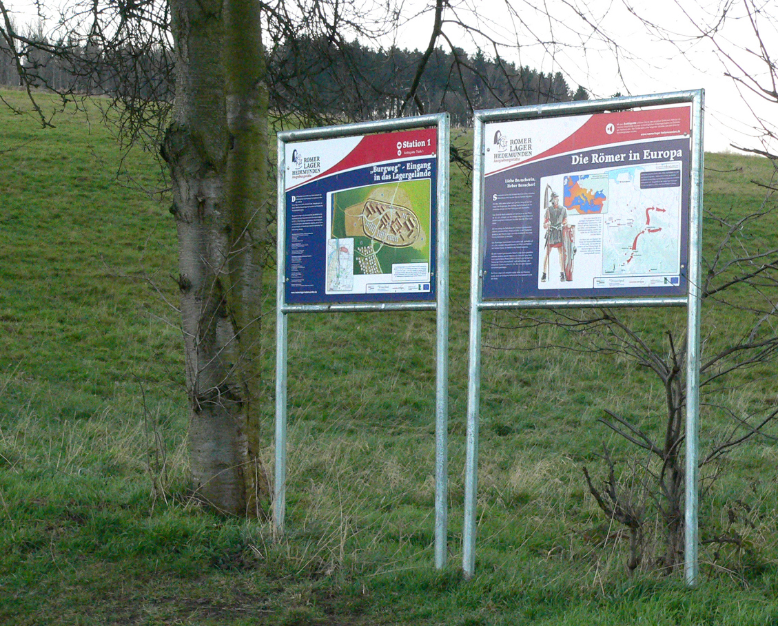 Römerlager Hedemünden, Rundwegstation 1 am Fuße des Burgberges